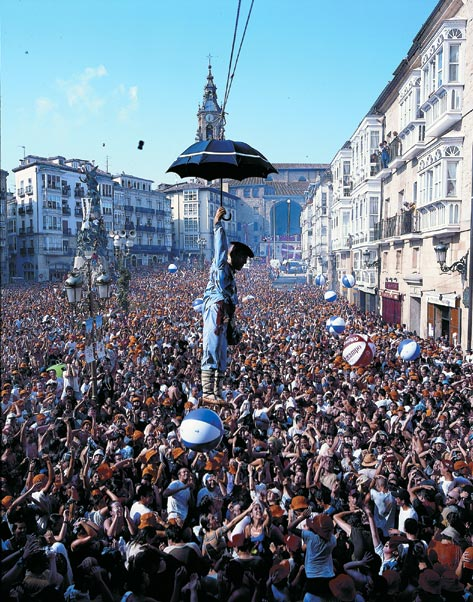 Fiestas de Celedón